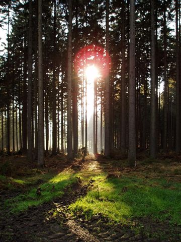 Herbstwald bei Scharfenberg, Fichten (Picea abies)